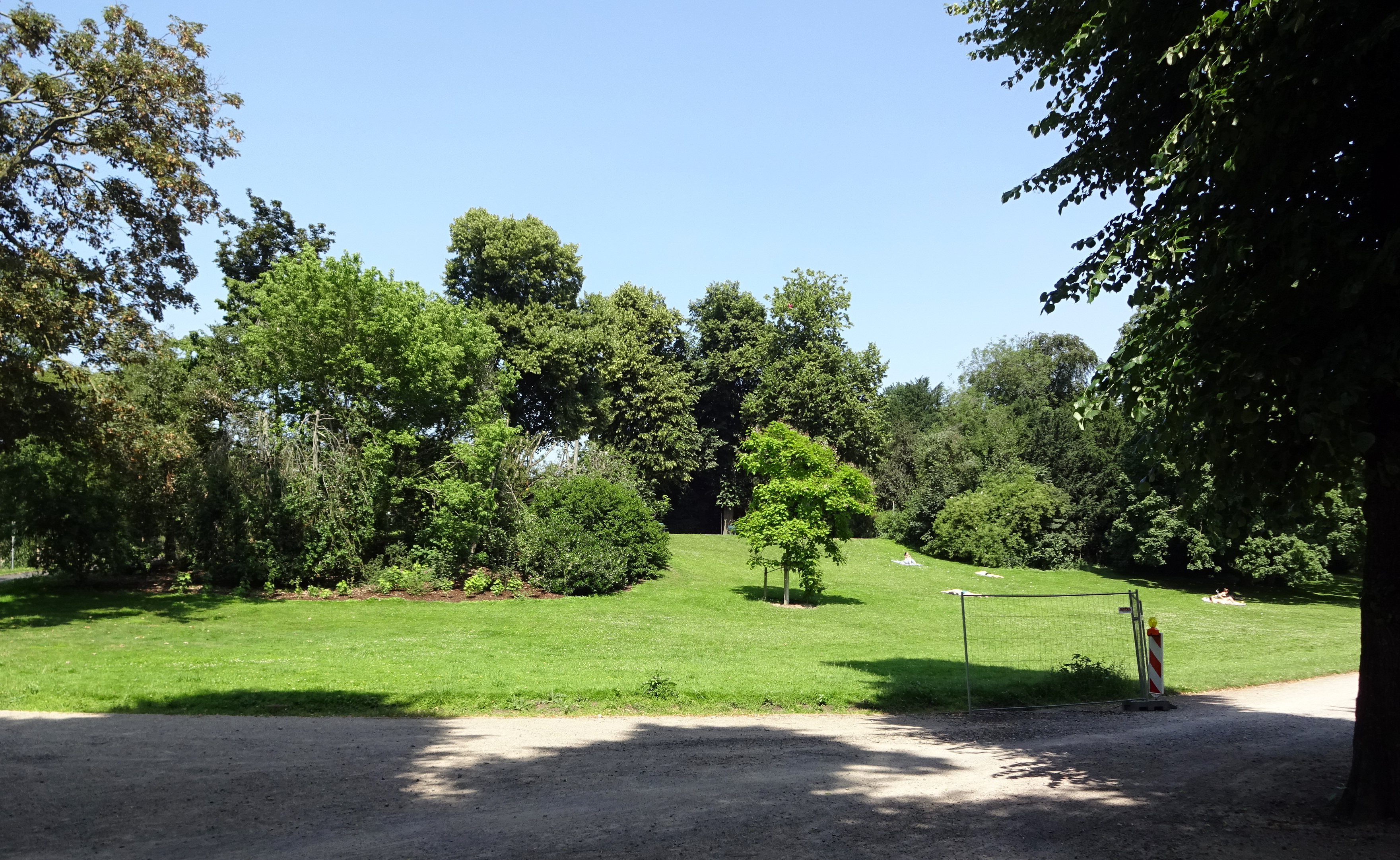 Napoleonsberg im Hofgarten Düsseldorf, Juni 2018